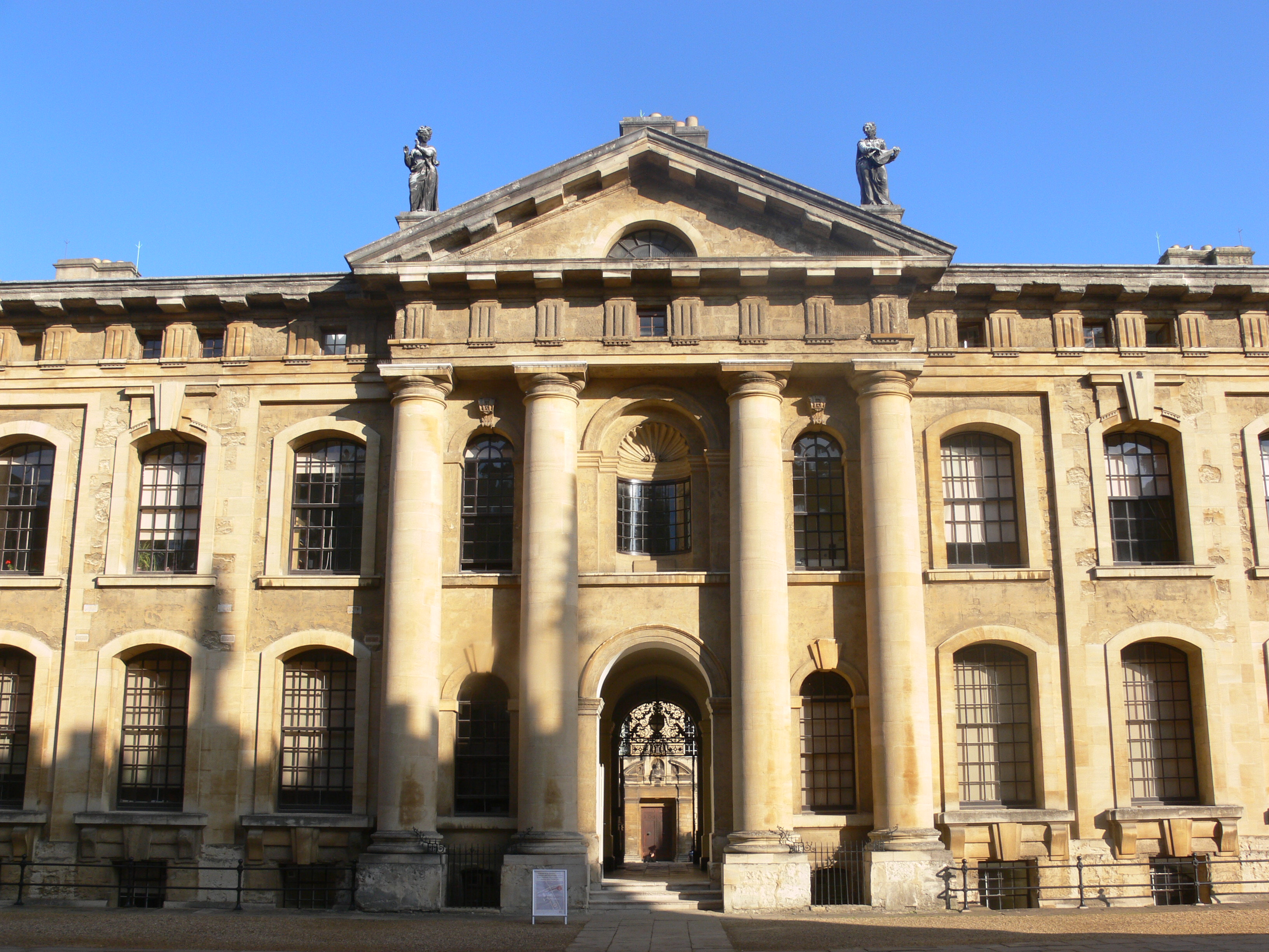 Oxford - Bodleian Library